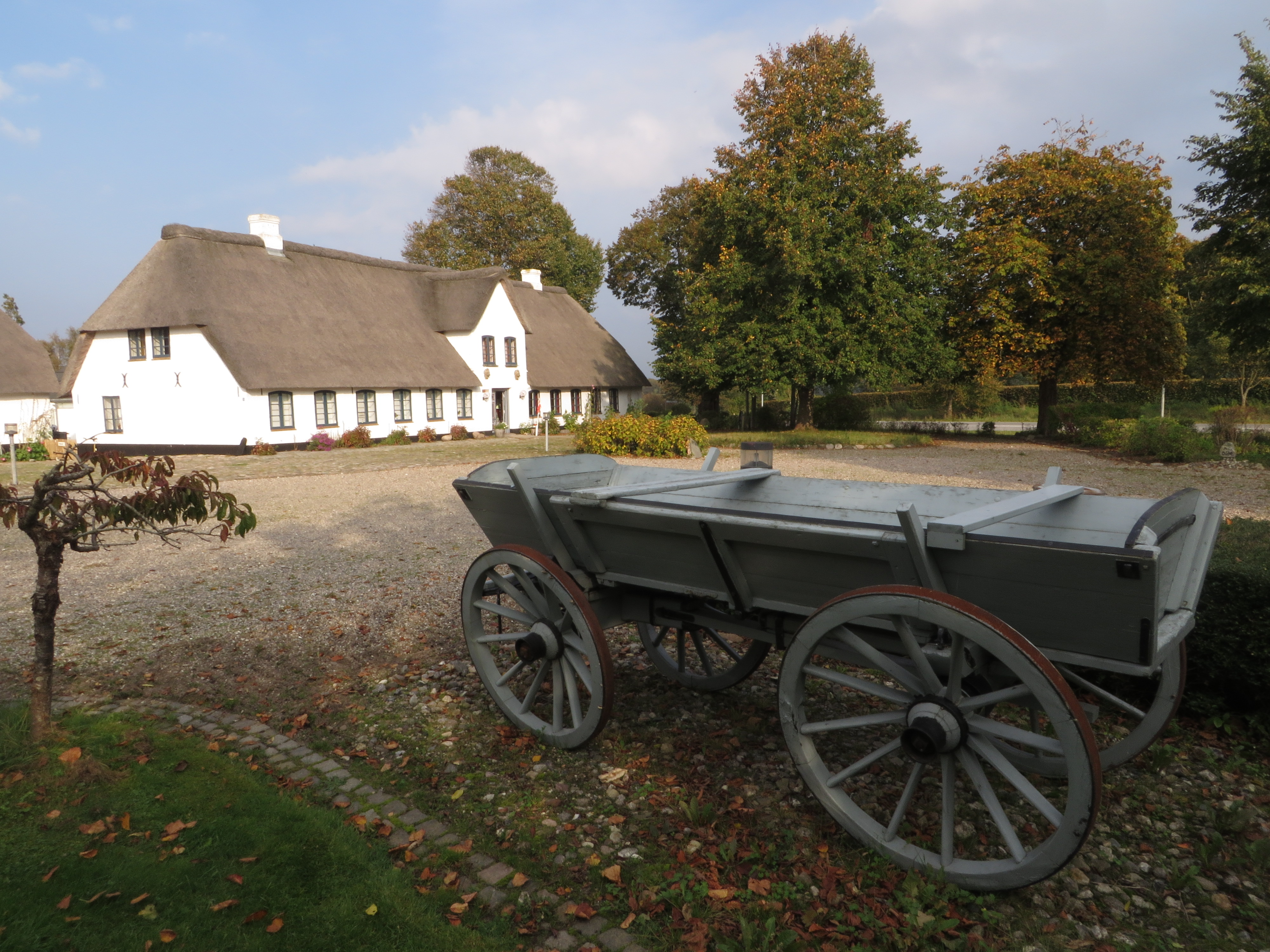 Waldemarstoft, Fuhrwerk mit Hauptgebäude im Hintergrund